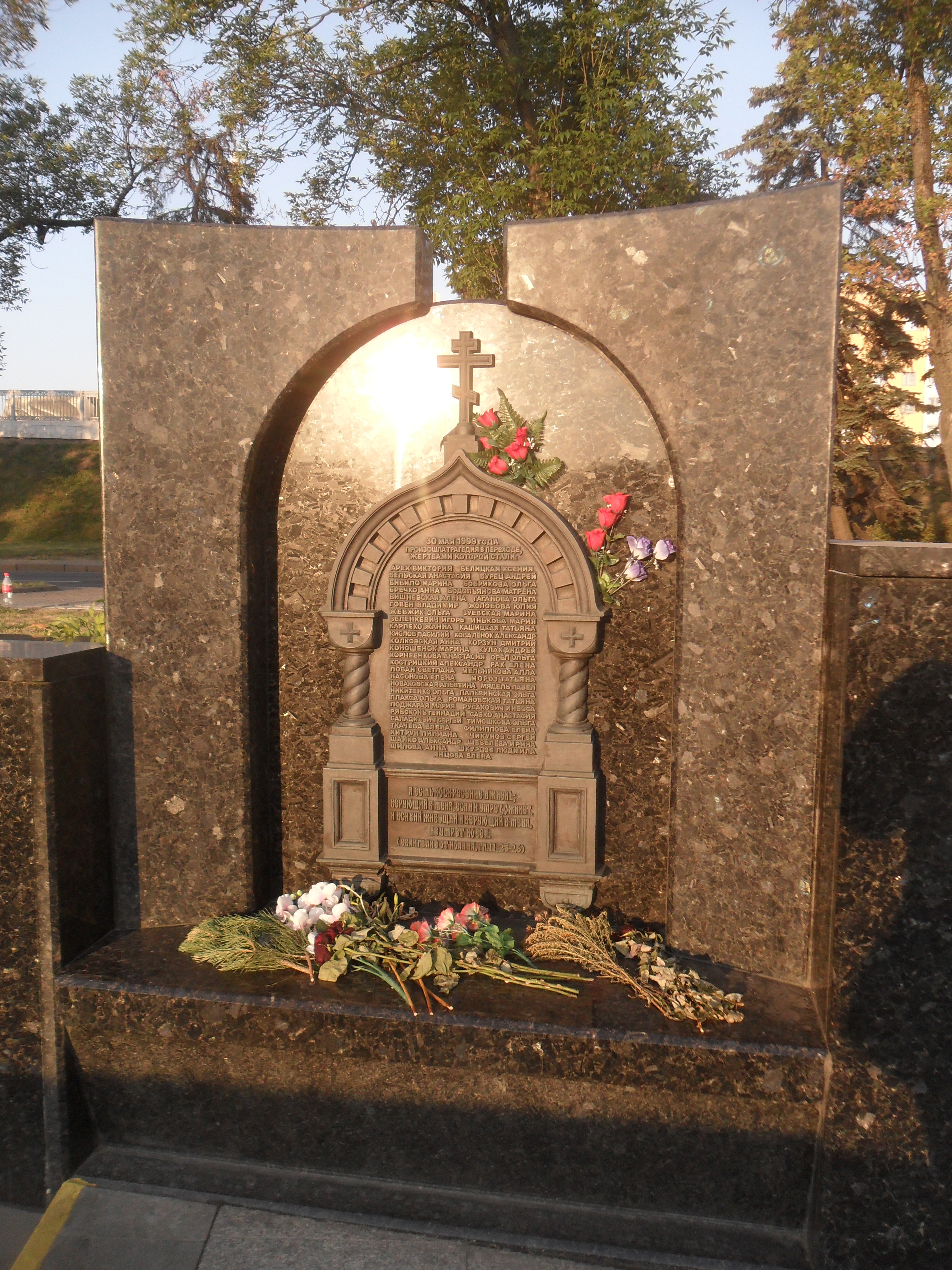 Памятный знак на месте давки на Немиге в Минске.